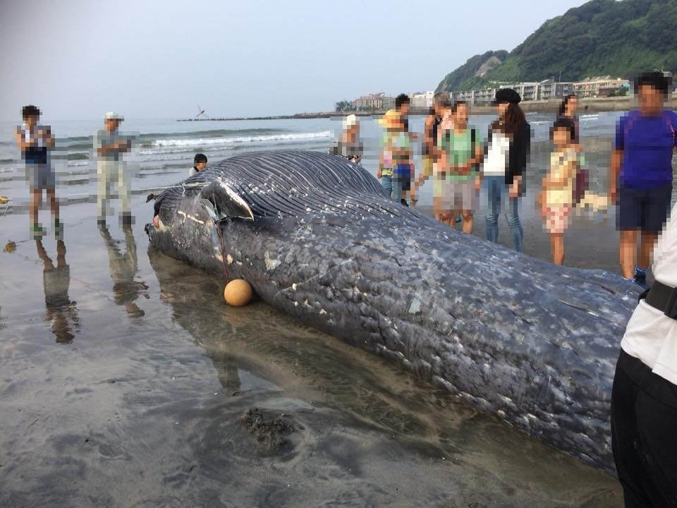 2018年8月5日、神奈川県鎌倉市由比ガ浜海岸にシロナガスクジラが漂着。漂着の翌朝撮影。